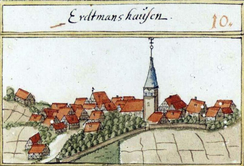 Erdmannhausen